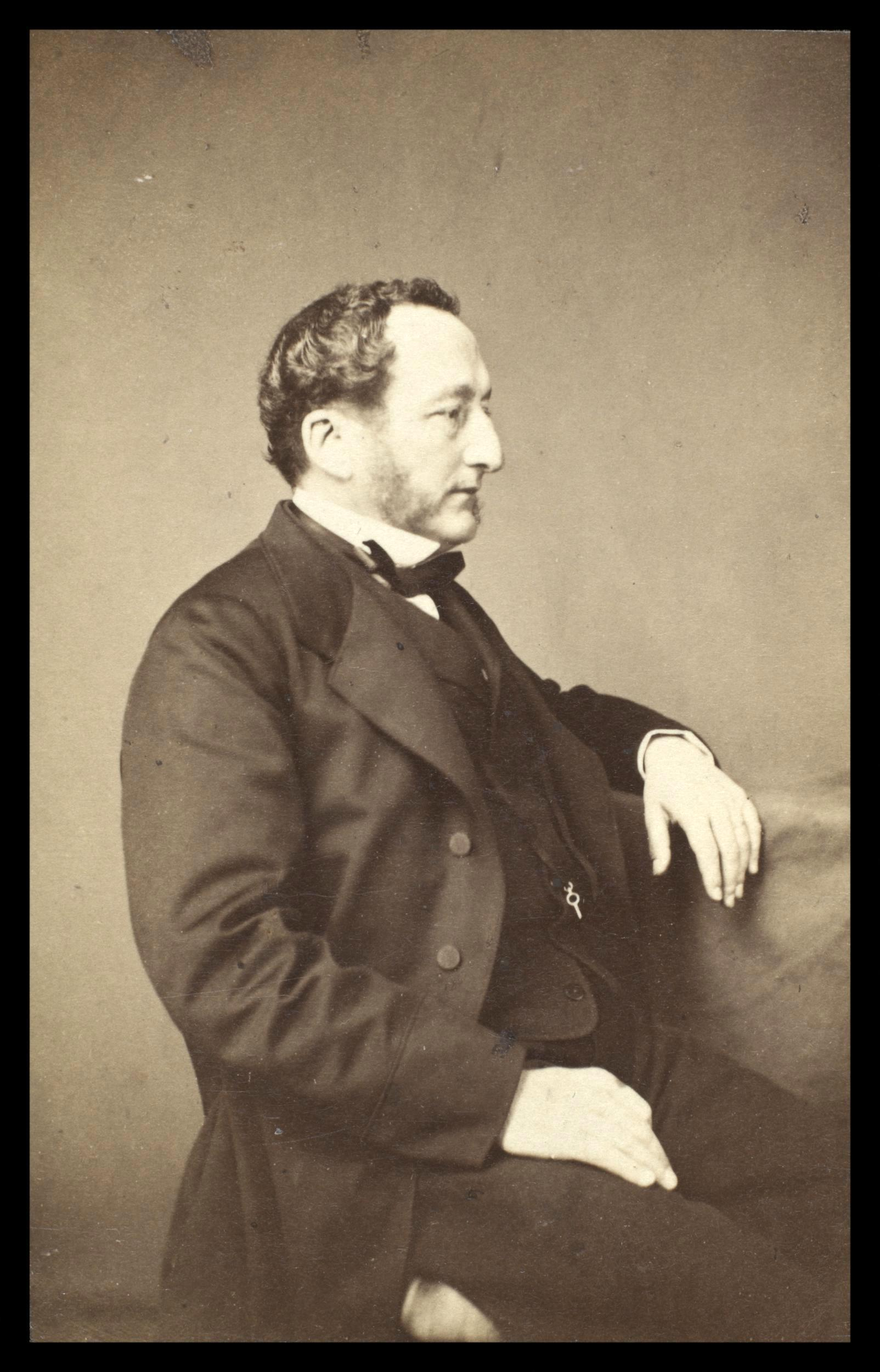 Photograph by Henry Hering